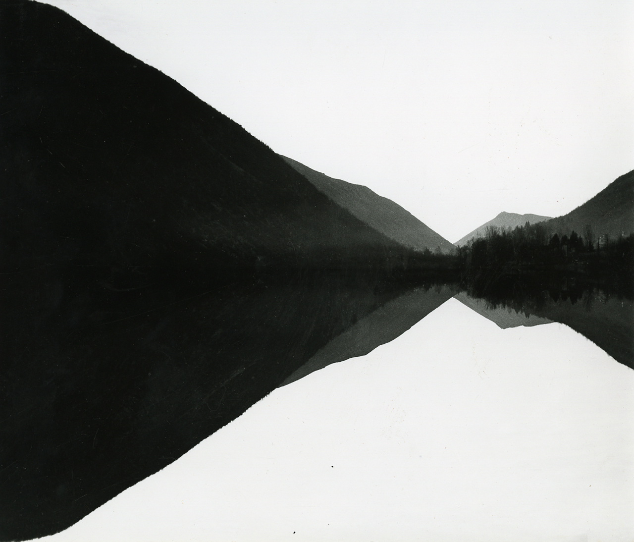 Serie fotografica : Italia, 1955 / Paolo Monti, Istituto di fotografia Paolo Monti. - Stampe: 2 : Positivo b/n, gelatina bromuro d'argento/ carta, 24x30. - ((Al verso delle stampe manoscritti i numeri dei negativi corrispondenti: R3545; iscrizione didascalica manoscritta a matita: "Lago di Ghirla - 1955"; timbro a inchiostro con copyright (Corso Sempione - Milano). - Le stampe potrebbero essere state realizzate dall'Istituto di Fotografia Paolo Monti. - Cartellina di cartone con stampe di vario formato (24x30 e 30x40) utilizzate dall'Istituto di Fotografia Paolo Monti per una mostra a Varese; sul fronte della cartellina iscrizione documentaria manoscritta a pennarello nero: "Varese/ mostra". - Tutte stampe contenute nella cartellina di cartone intitolata "Varese/ Mostra" sono state esposte in una mostra a Varese nel 2008.